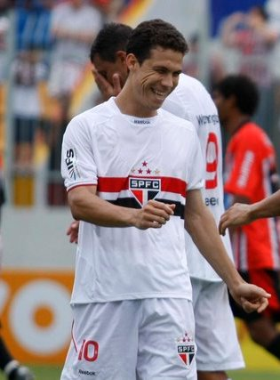 Hernanes em ação no São Paulo Futebol Clube em 2010